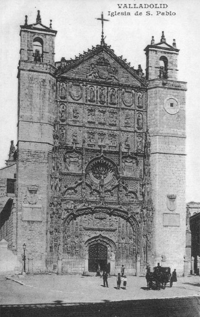 Iglesia de San Pablo. Fachada - Valladolid - Colección Valladolid, postales para el Recuerdo, editada por el Diario El Mundo de Valladolid. Valladolid. Iglesia de San Pablo. - Fotografía. Papel 90 x 140 B/N